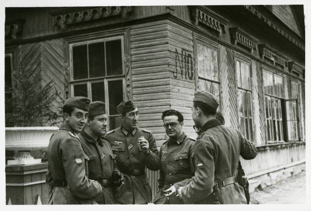 Agustín Aznar (aproximadamente 1941-1943)